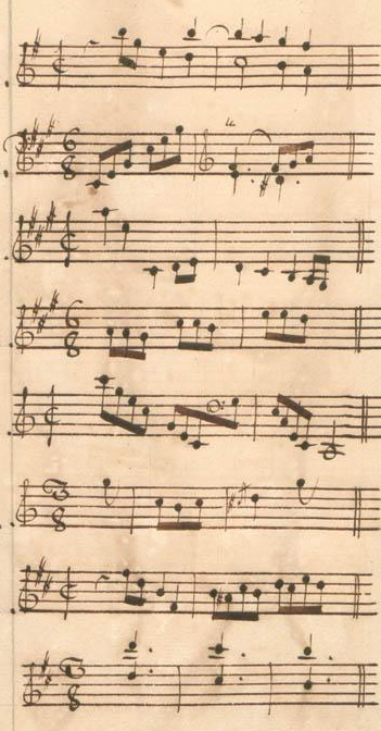 Table du volume XI des manuscrits de Parme (incipit des sonates 15 à 22, K. 402-409).